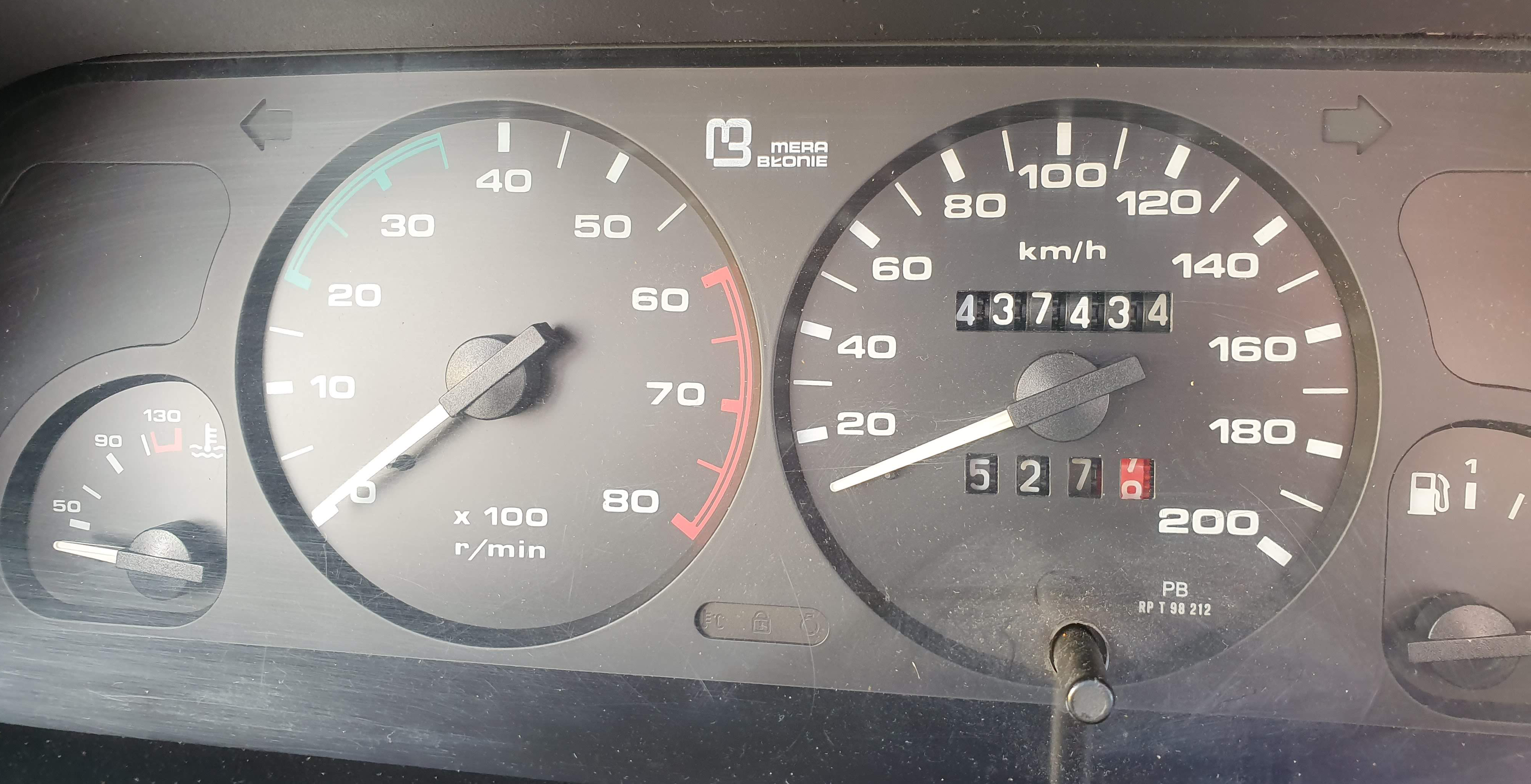 Daewoo-FSO Polonez Caro Plus 1.6 GSI z oryginalnym przebiegiem blisko 440 tys. km.